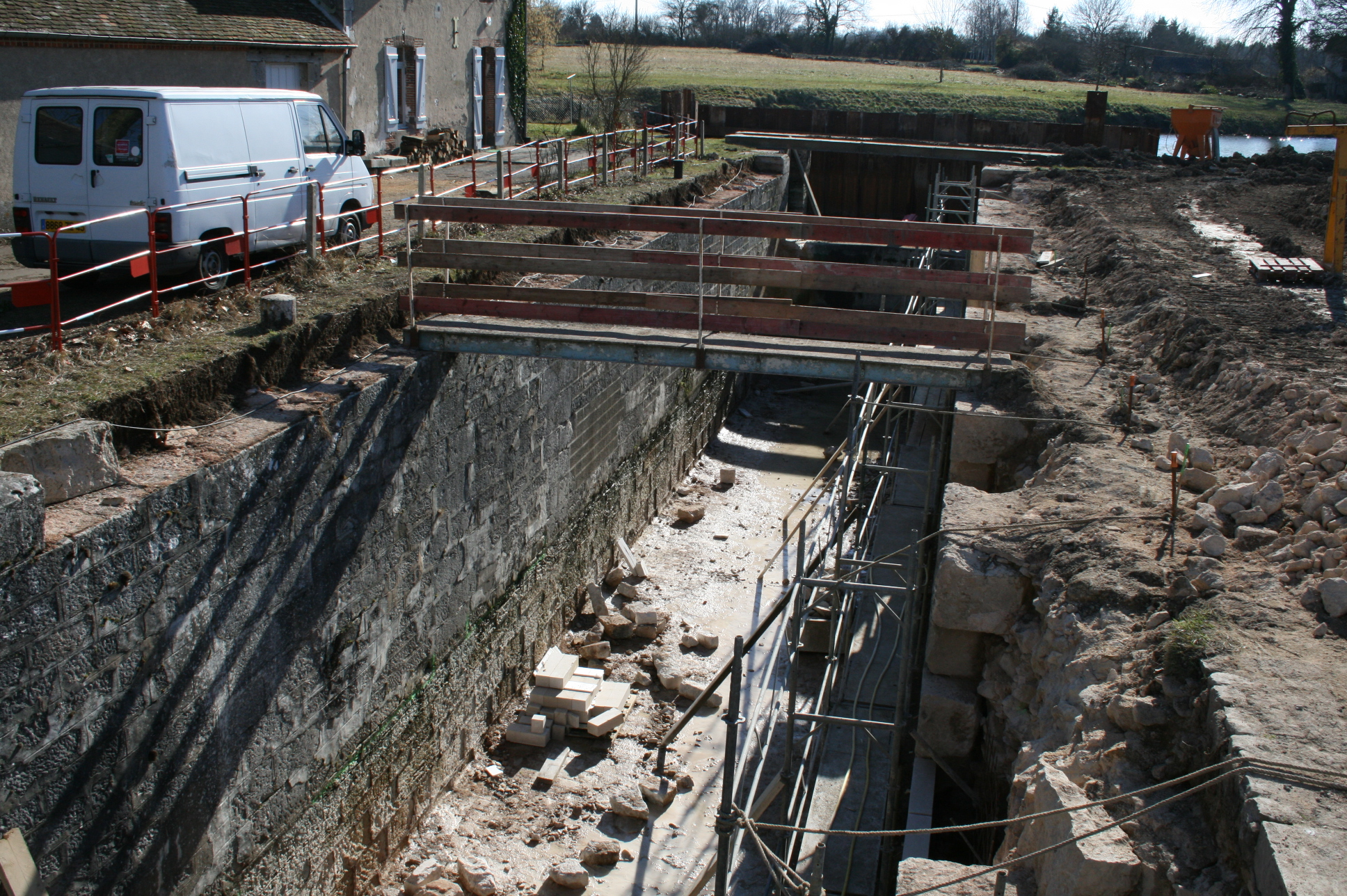 Canal d’Orléans. Ecluse du Bas de Grignon en cours de restauration en 2009 - Commune de Coudroy.